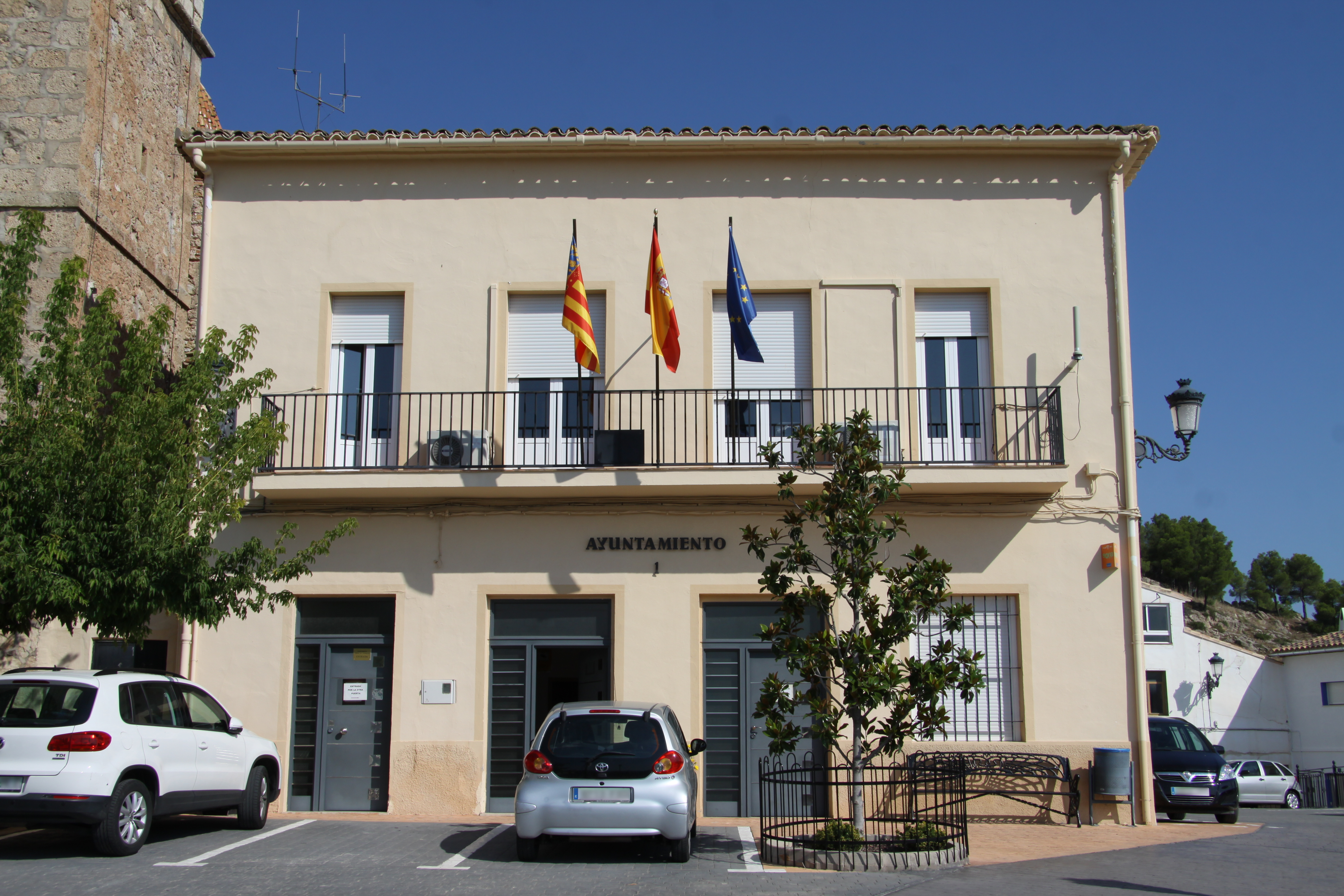 ayuntamiento